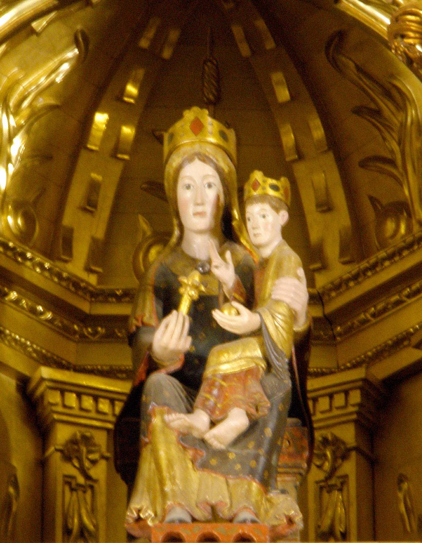 Retablo mayor del Monasterio de Santa María la Real (Nájera, La Rioja)